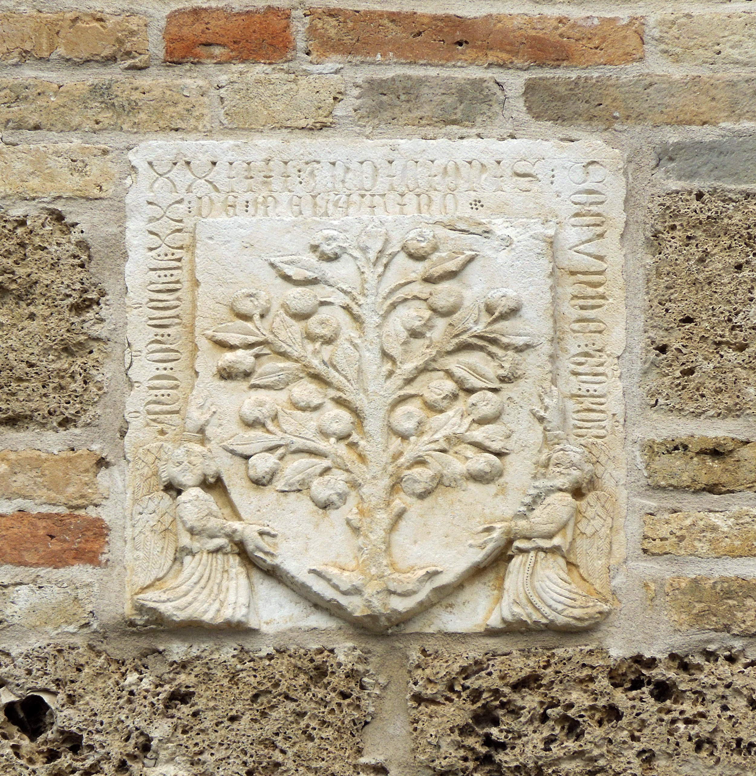 Stemma della nobile Famiglia dei Melatino, di origine longobarda, che ha risieduto a Teramo presso il castello di Melatino dal XIII secolo. Si estinse, quando gli ultimi esponenti della famiglia furono delle donne andate in moglie ai Berarducci di Teramo. Lo stemma della famiglia, murato sulla facciata della Torre del Melatino, è caratterizzato da un albero di melo.